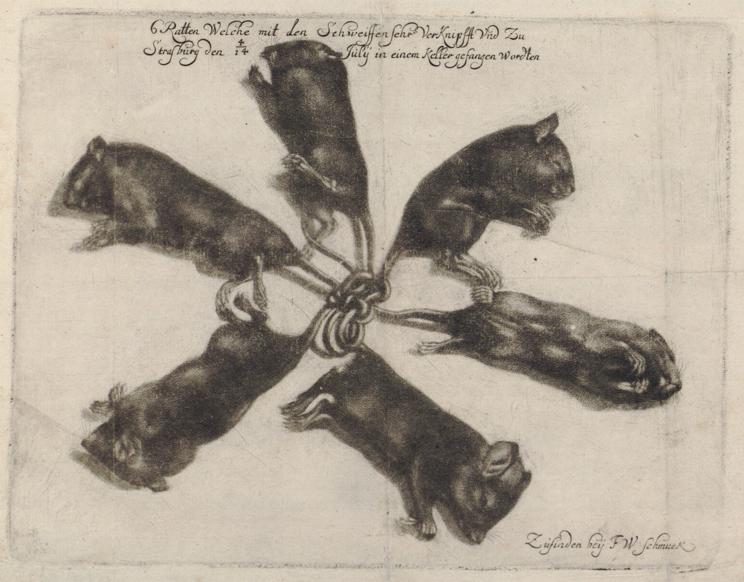 6 Ratten Welche mit den Schweiffen sehr VerKnipfft Vnd Zu//Strasburg den 4./14. Julij in einem Keller gefangen wordten. Verleger: Friedrich Wilhelm Schmuck, um 1683